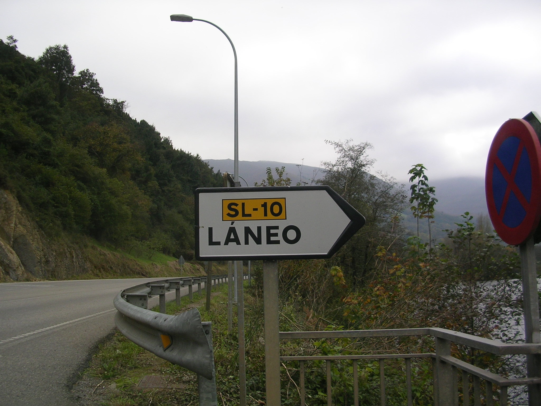 Cartel de entrada a Láneo.